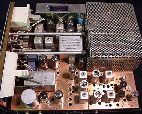 Vista interior del TR-4